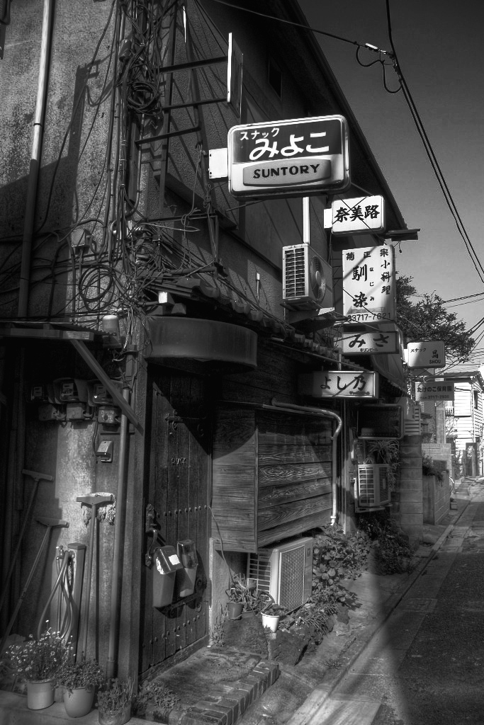 Old snack bars in Jiyugaoka, Tokyo, Japan.